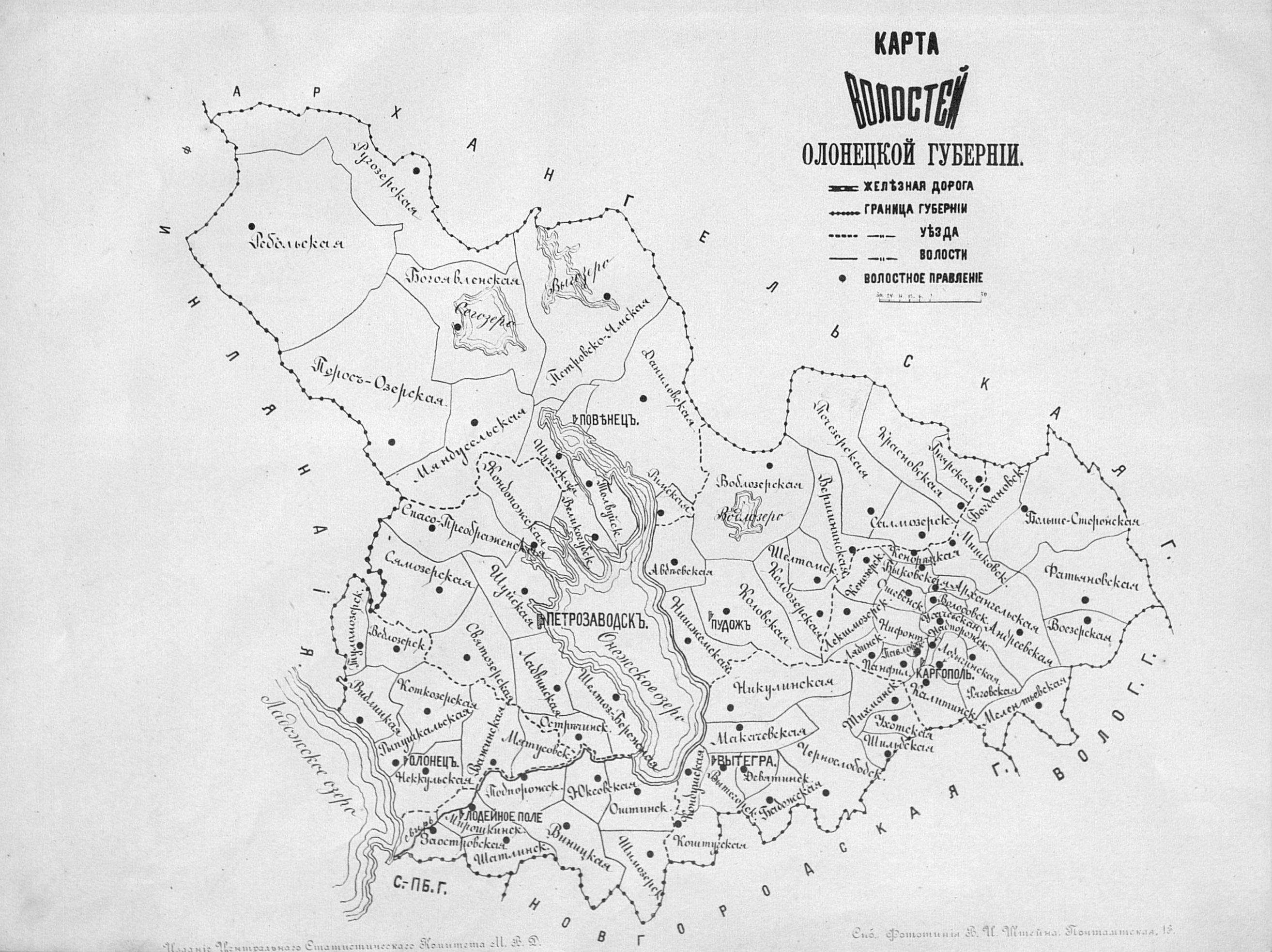 Карта волостей Олонецкой губернии